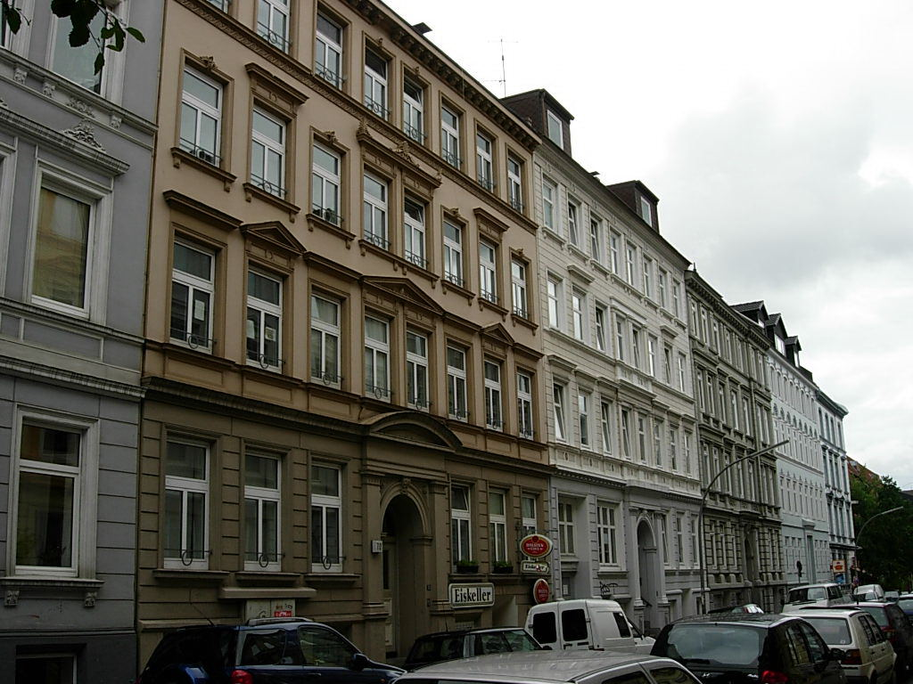 Die Virchowstraße in Altona-Altstadt mit der Gaststätte Eiskeller